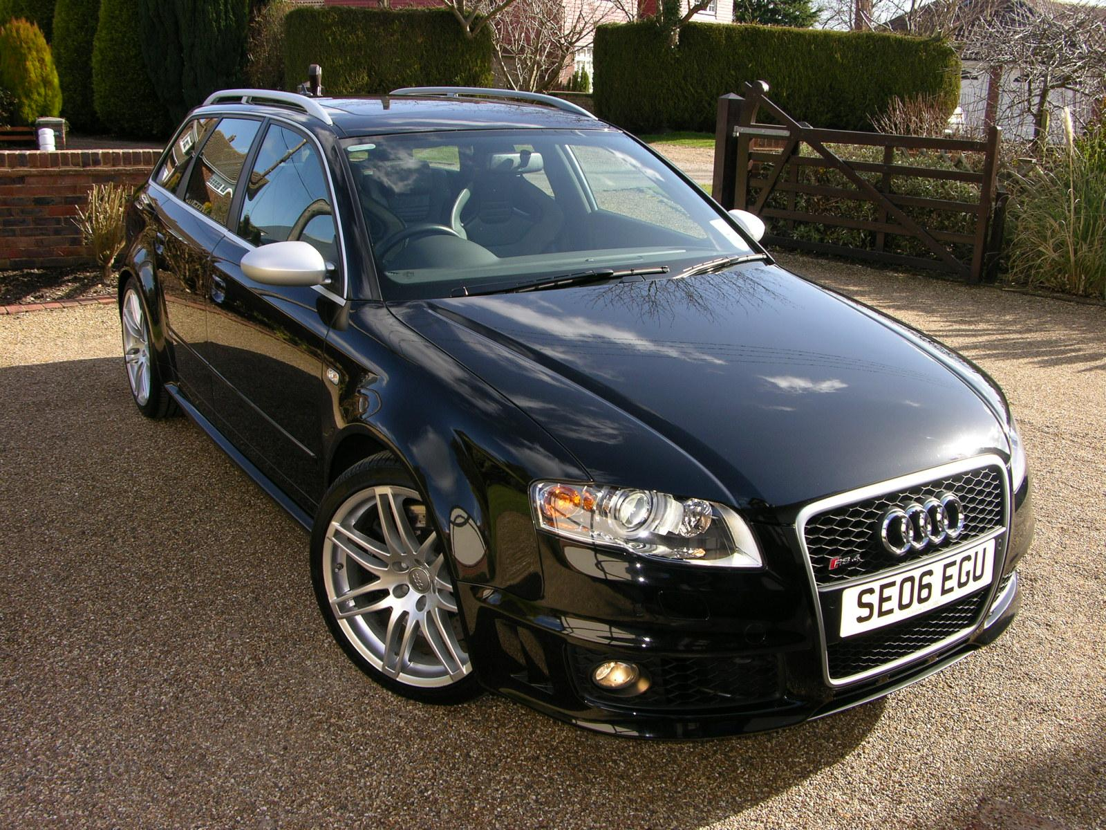 2006 Audi RS4 Avant